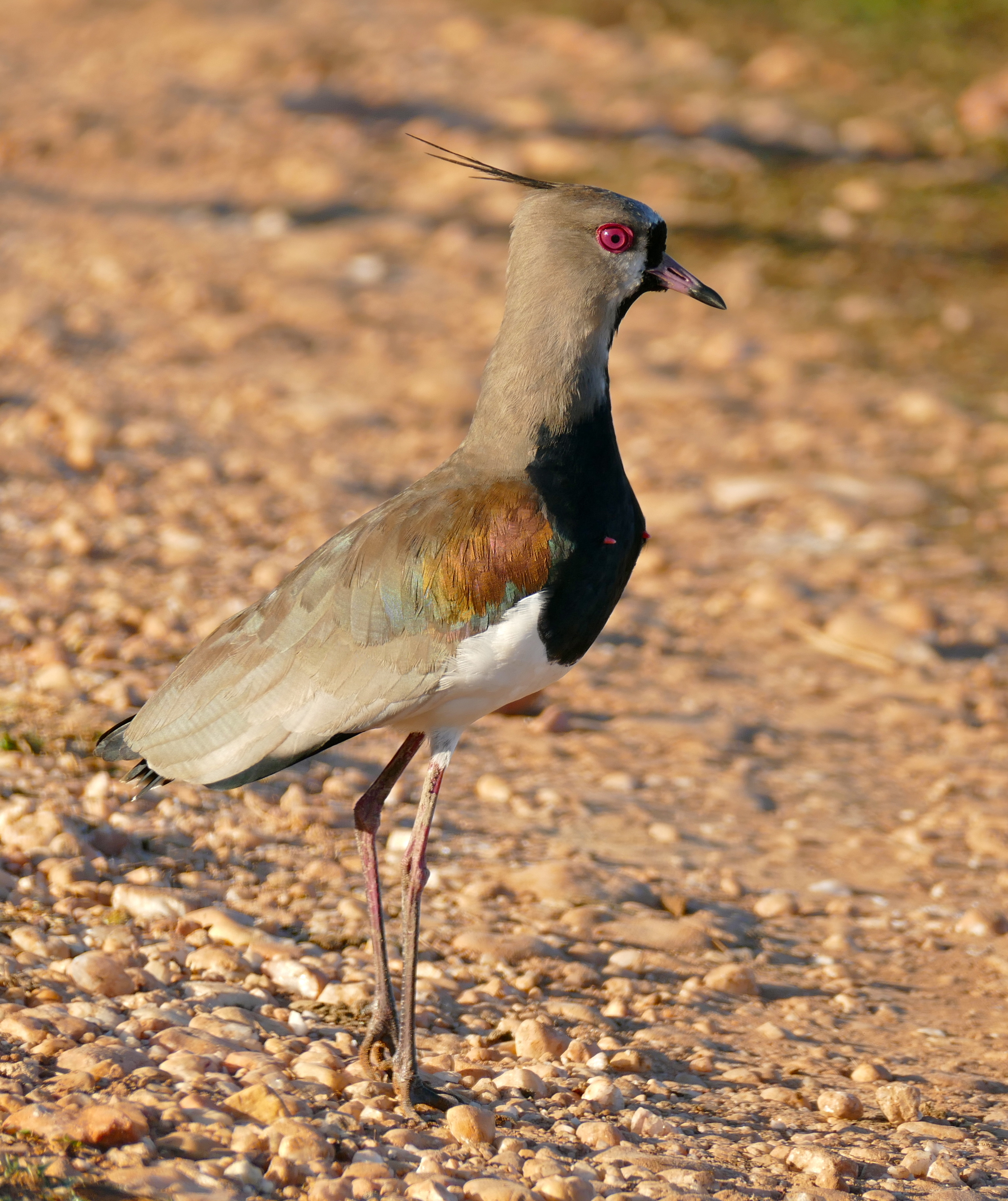 Pouso Alegre, Transpantaneira, Poconé, Mato Grosso, BRAZIL